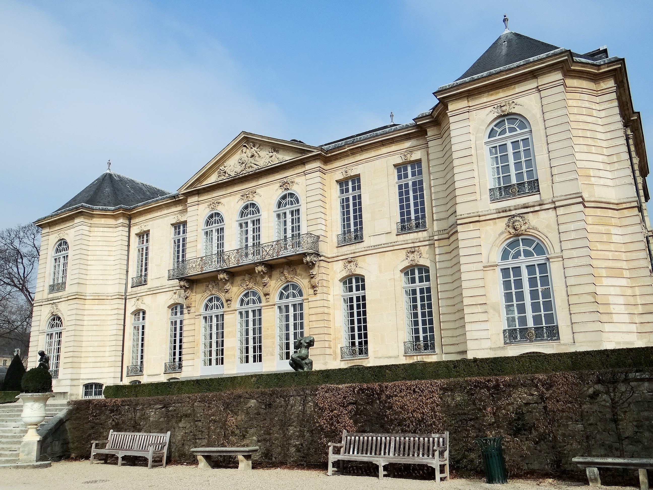 Hotel Biron, côté jardin (musée Rodin, Paris) .